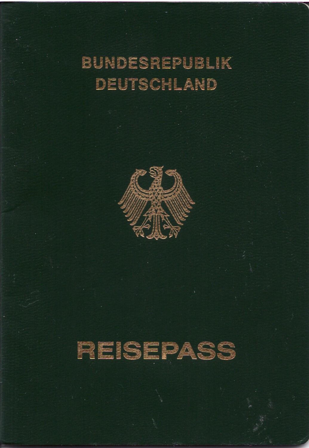 Vorläufiger deutscher Reisepass - grün